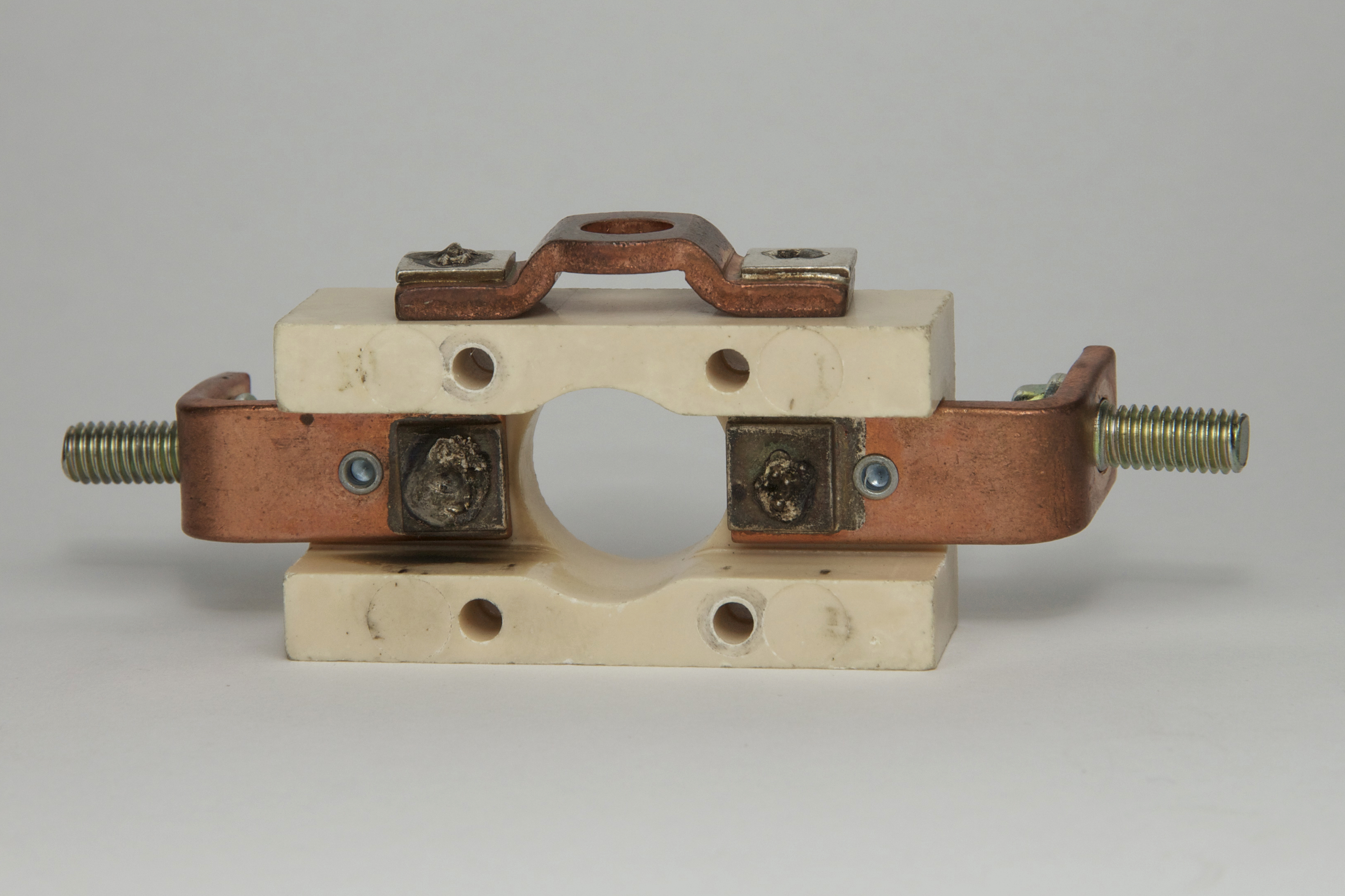 Ein Schützkontakt von einem Gabelstapler, 48 V